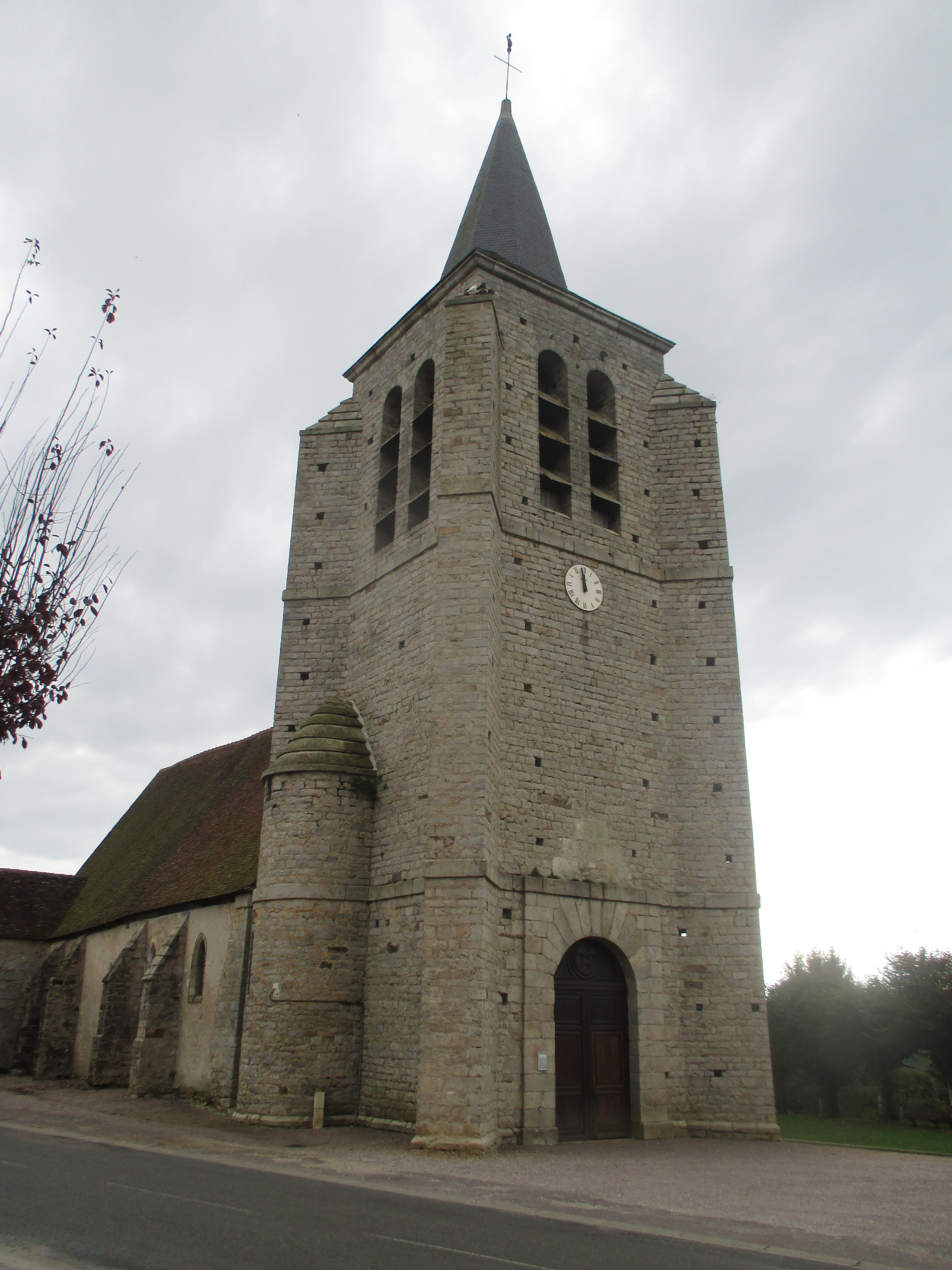 Église Saint-Louis de Chaumot (Yonne, diocèse d'Auxerre-Sens).